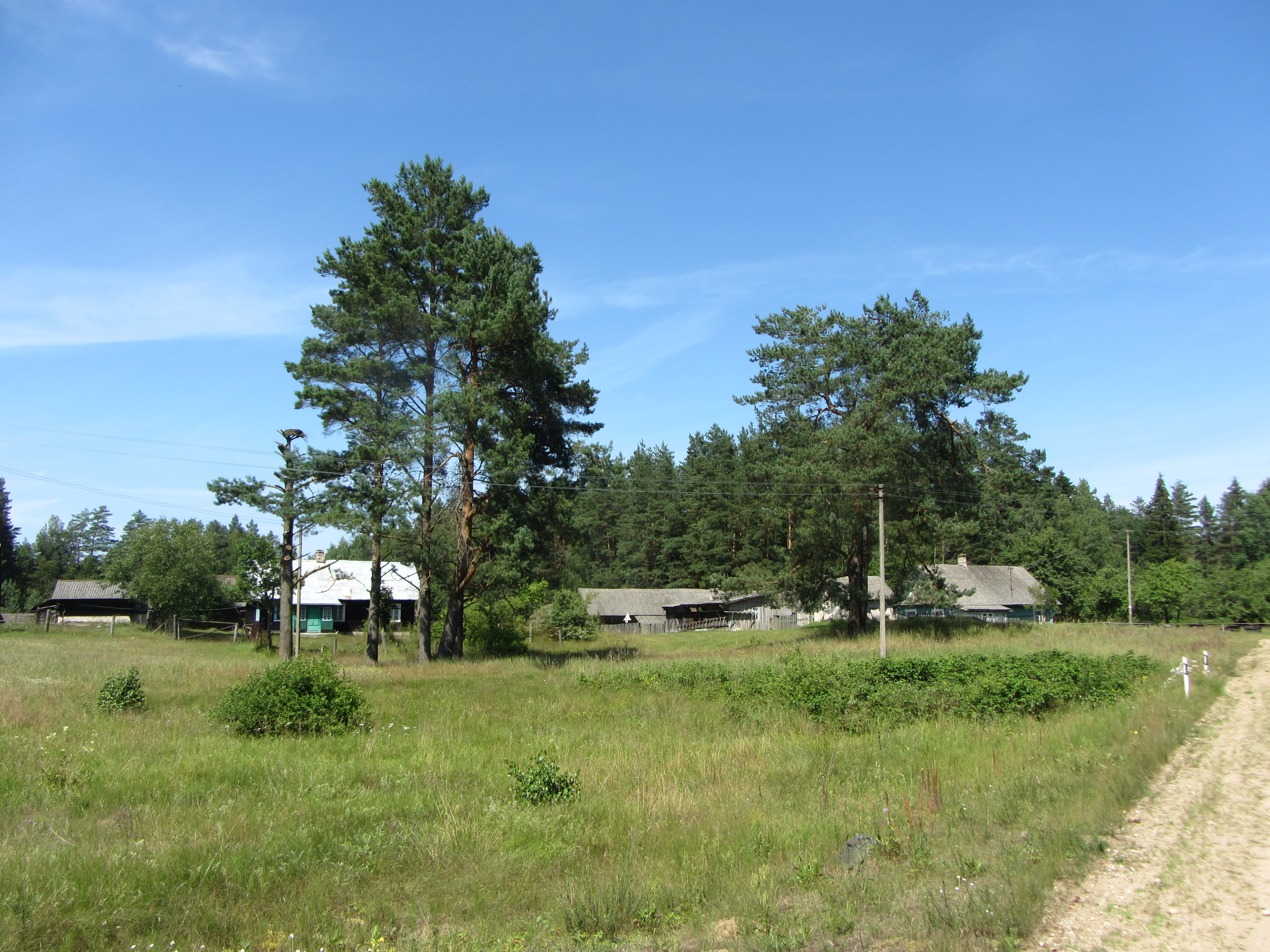 Kaniavos sen., Lithuania